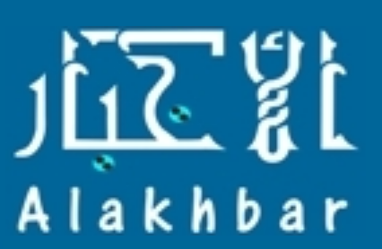 Logo ALAKHBAR Mauritanie